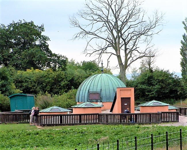 Stjärneborg op het eiland Ven. Eigen foto Jan Lapère.